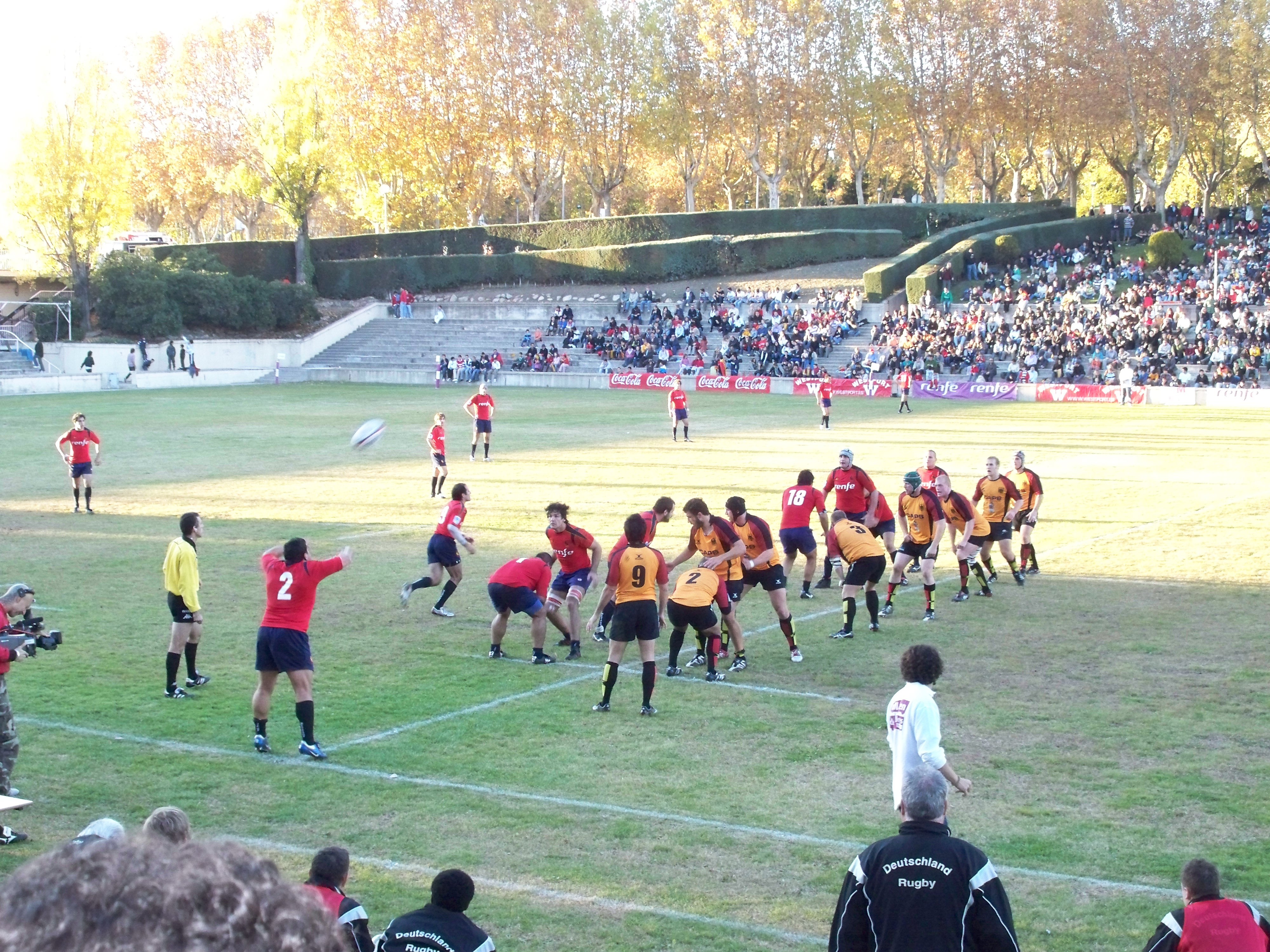 Touch durante partido entre España y Alemania